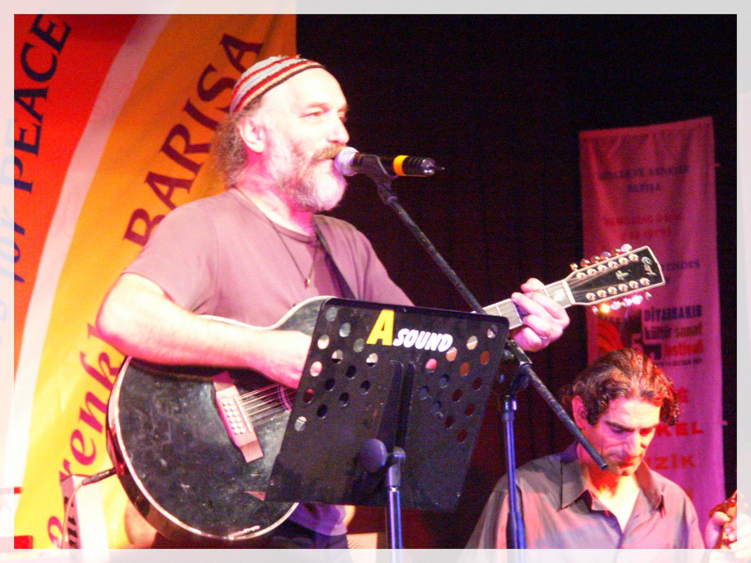 Fuat Saka at the Diyarbakir Kültür Sanat Festivali